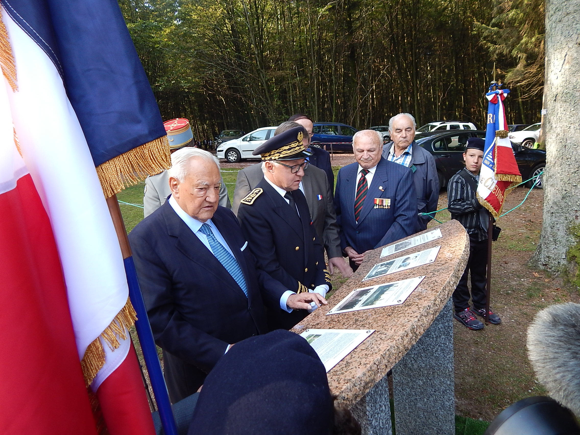 Le 07 septembre M. Gilbert PAYET, Préfet des Vosges, M. Christian PONCELET, Ancien Président du Sénat, M. François VANNSON, Député ses Vosges, ont inauguré le pupitre relatant l'historique du Maquis du Haut du Bois